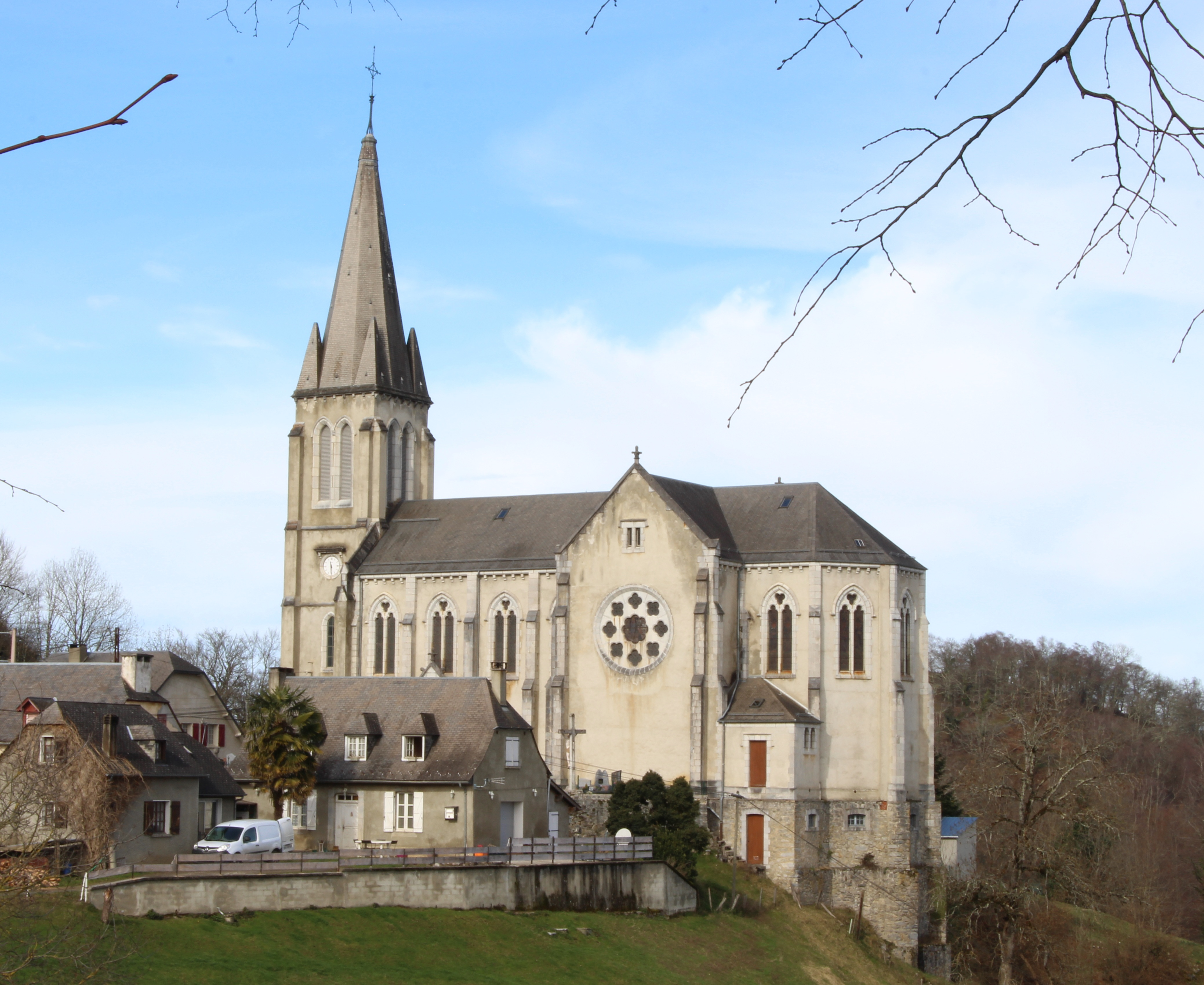 Église Saint-Martin de Labassère (Hautes-Pyrénées)